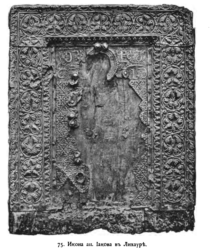 ქართული სიზველეები